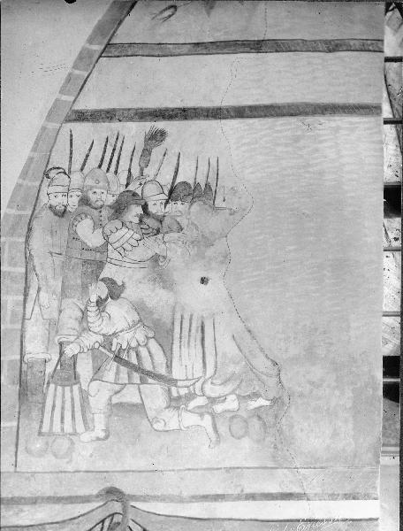 Kalkmålning, norra väggen, 1600-talet. Efter konservering. Kategori: (03) KalkmålningarKalkmålning, norra väggen, 1600-talet. Efter konservering.